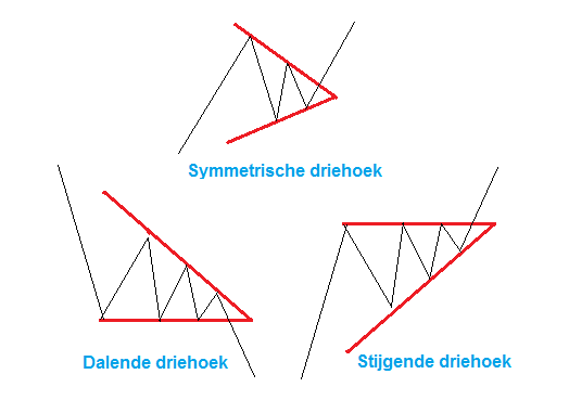 Driehoek chartpatronen